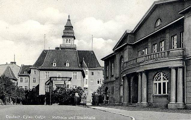 Kino X MUZA w Iławie i Ratusz